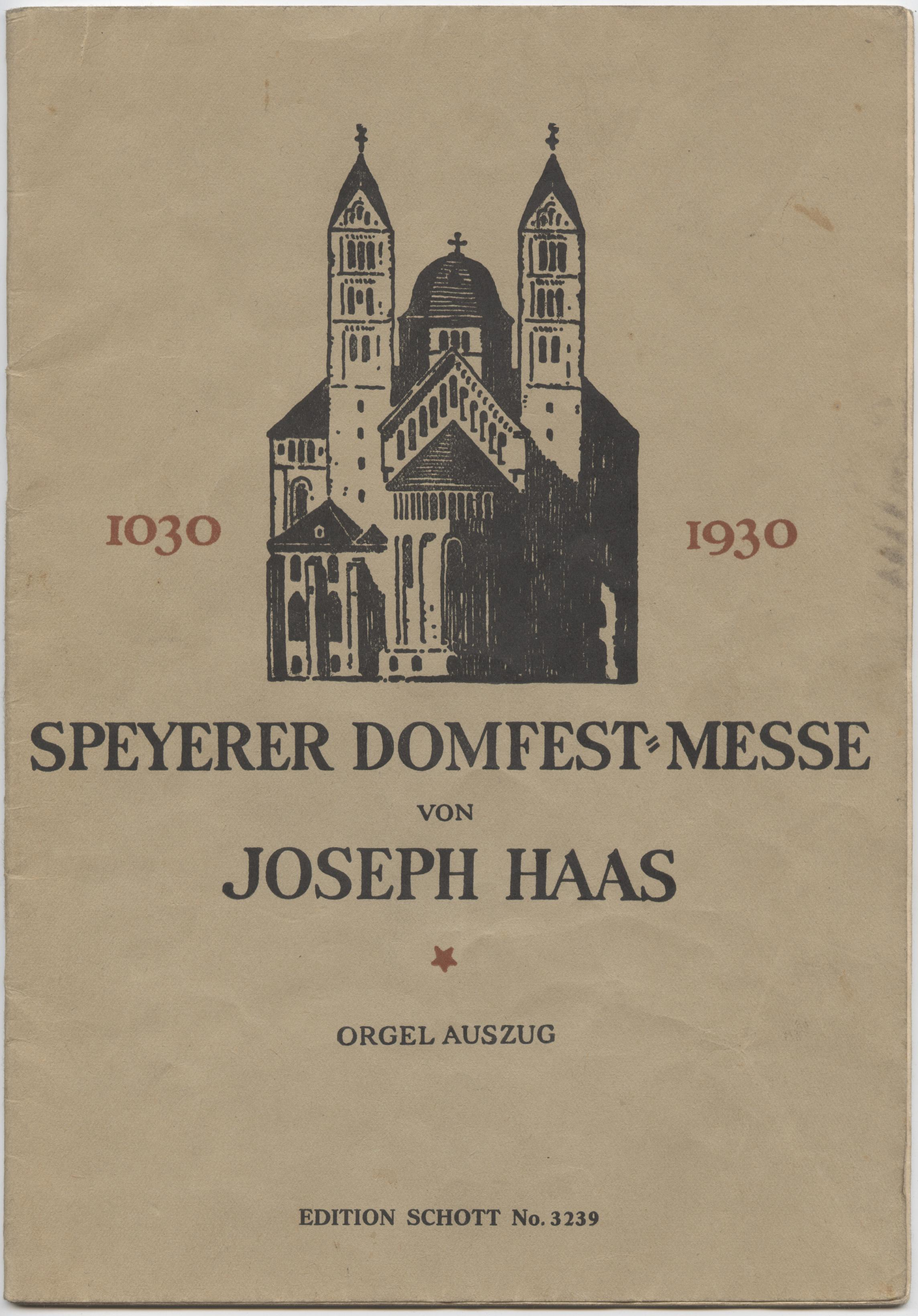 Joseph Haas, Speyerer Domfestmesse, 1930, Partitur